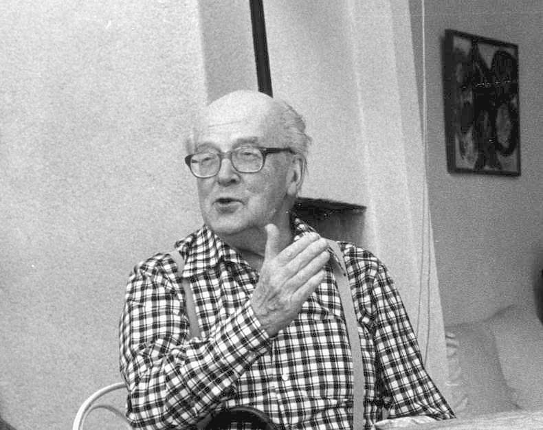 Jean Le Moal, peintre non figuratif français (1909-2007) : photographie du peintre en Ardèche